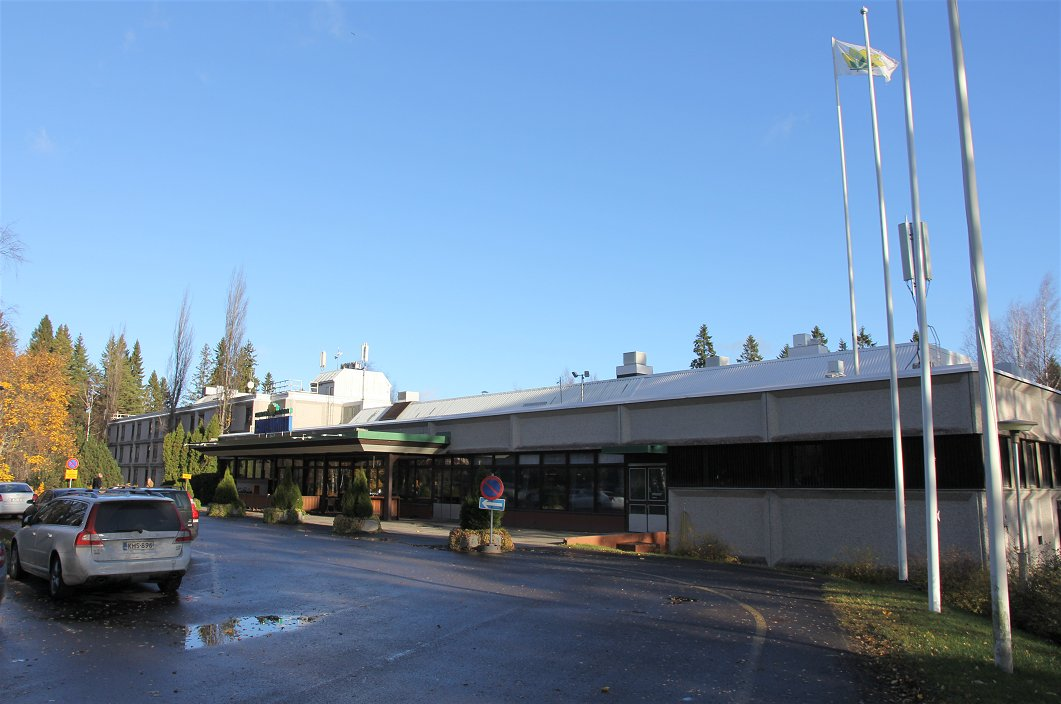 Rauhalahti on luonnonläheinen kylpylähotelli ja matkailukeskus Kuopion Leväsen kaupunginosassa. Kylpylähotellin katuosoite on Katiskaniementie 8.